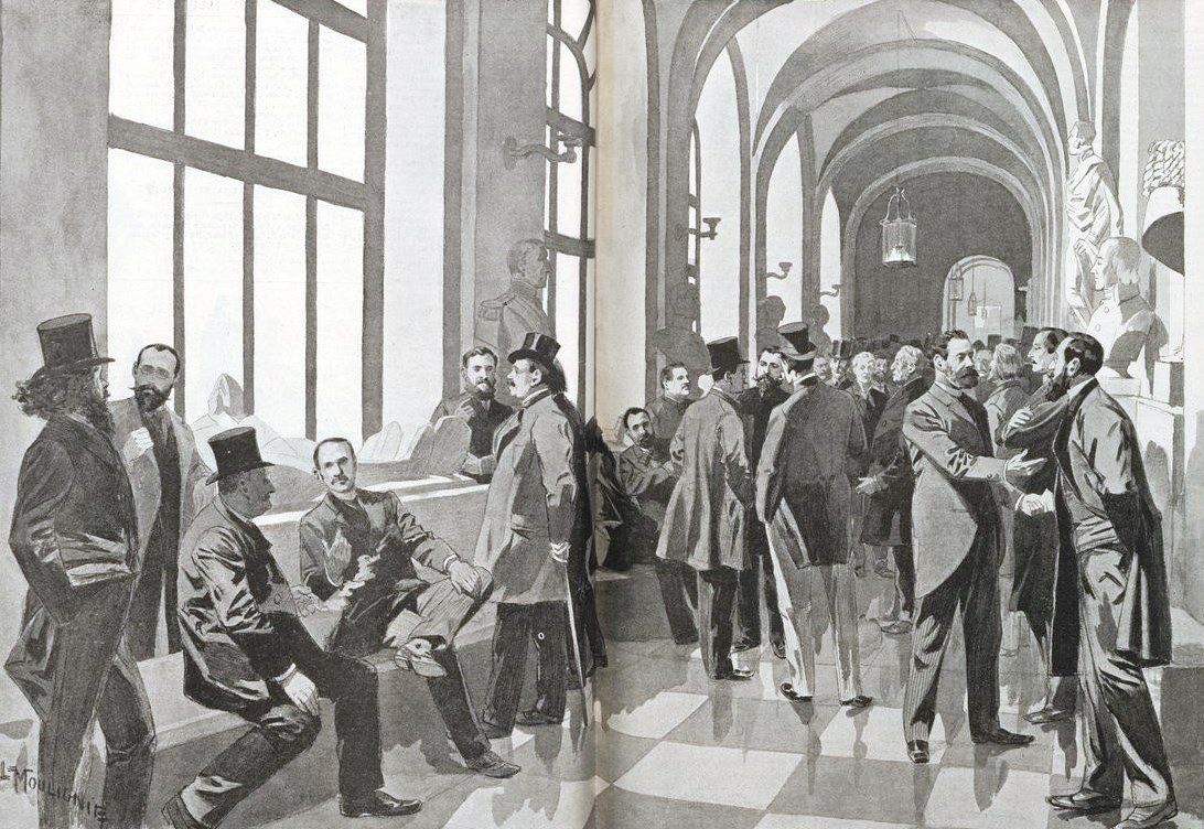 "Versailles. - Élection du président de la République. - Vue de la galerie des tombeaux, pendant le dépouillement des votes. - (Dessin d'après nature de M. Moulignié.)"